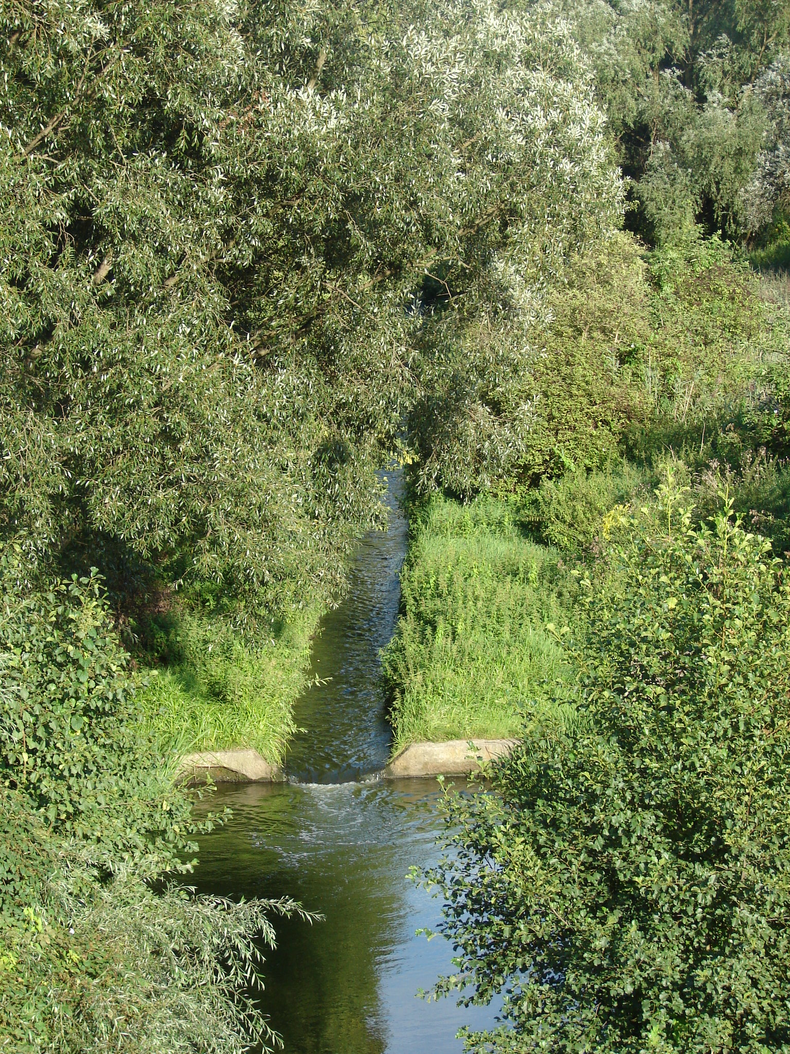 Główna River in Główna, Poznań